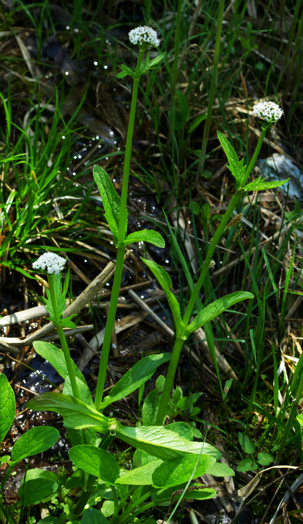 Kozłek całolistny (Valeriana simplicifolia) na terenie użytku ekologicznego Młaki nad Pogorią